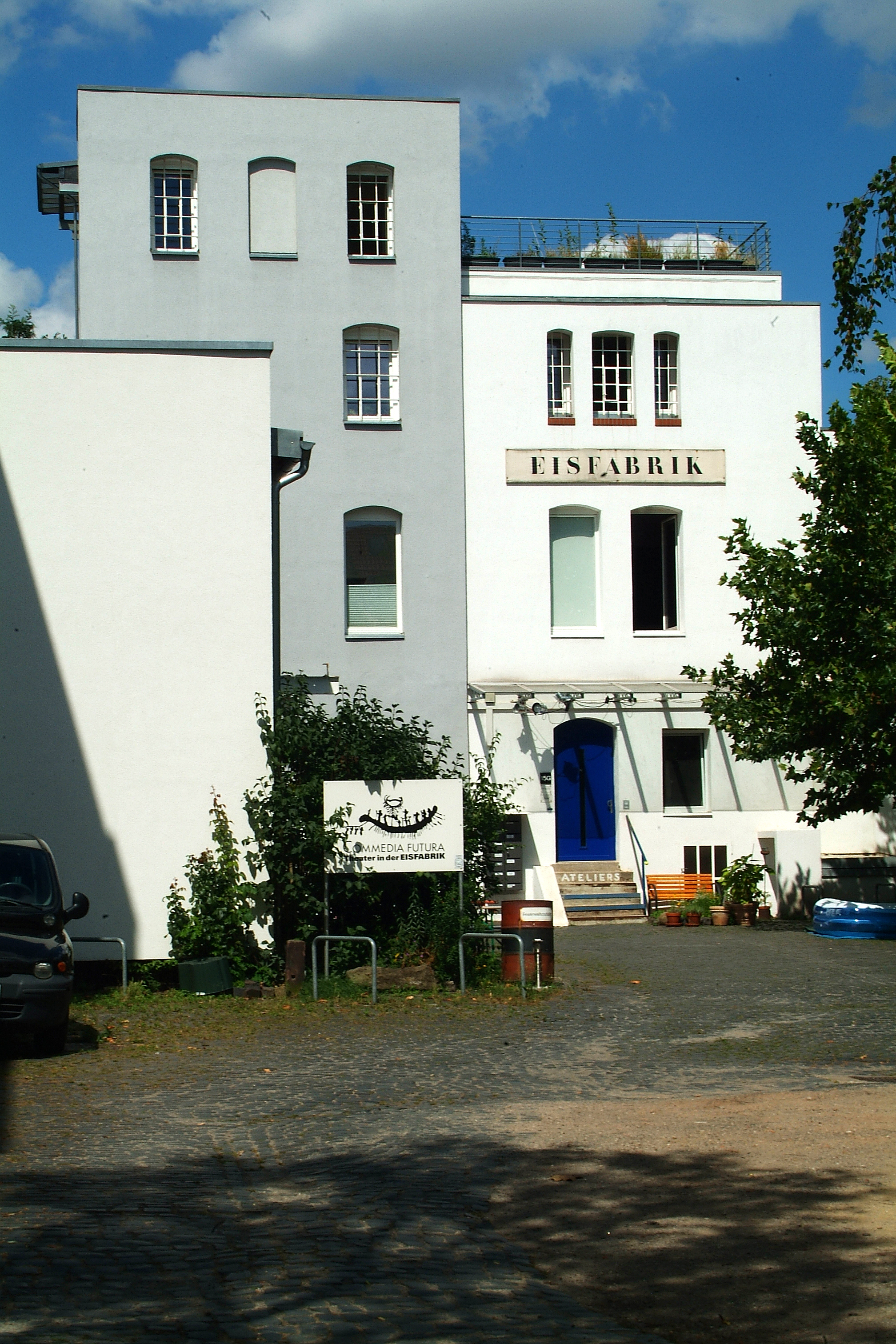 Gebäude des Theaters Commedia Futura, sowie Künstlerateliers ...